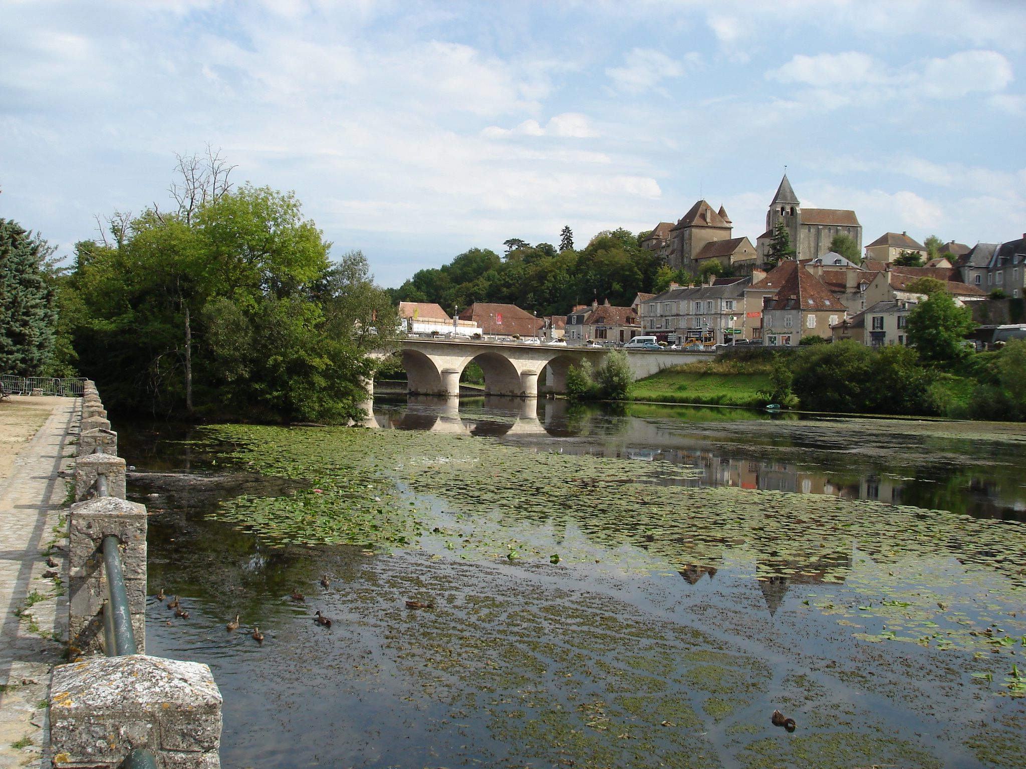 Le Blanc (36) : Le pont de la rue de Souvigny et la rivière Creuse.